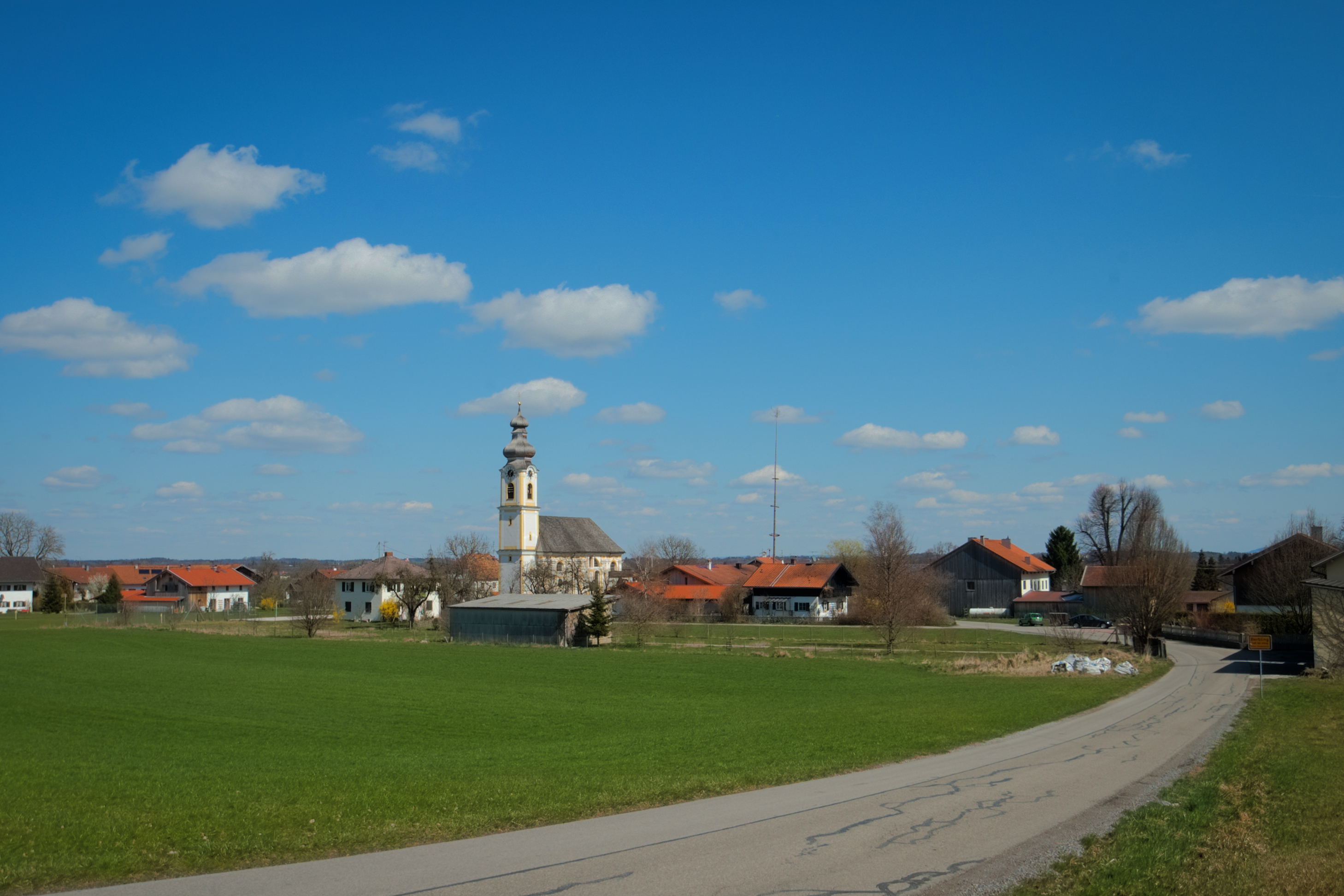 Berbling (Gemeinde Bad Aibling) von Süd-Westen.